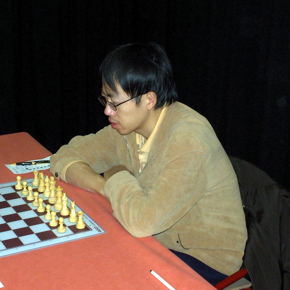 GM Li Shilong, Delft 2008